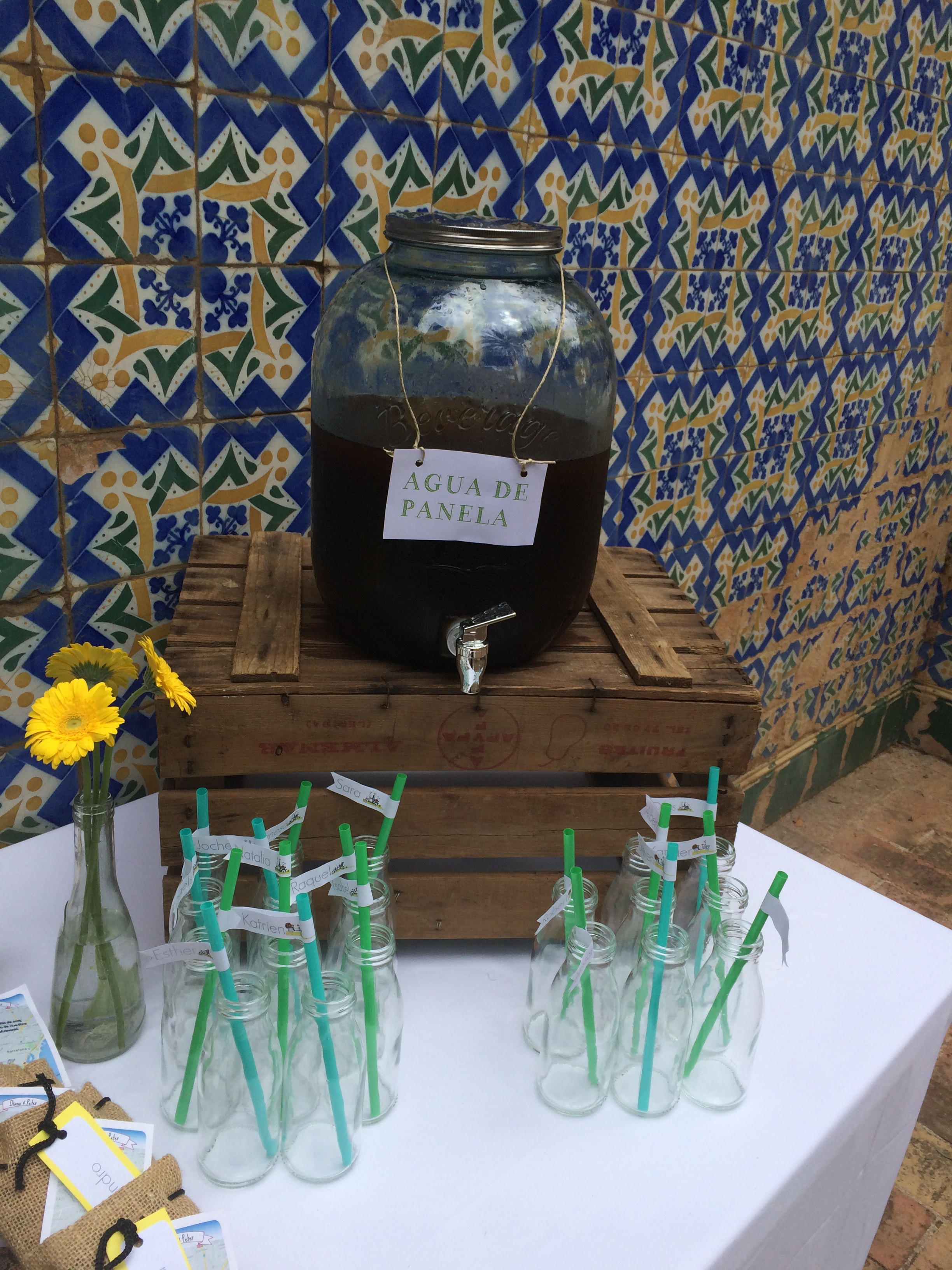 Aigua de Panela, Producte Típic de Colombia